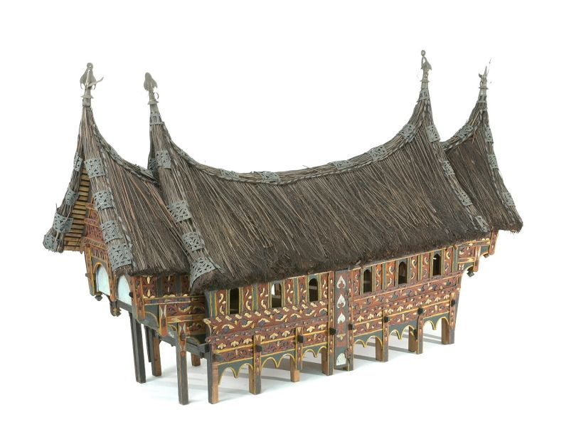 Huismodel. Model van een huis Unknown language: Rumah gadang